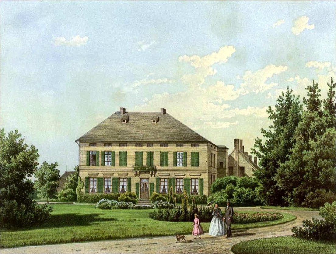 Rittergut Schlüsselburg, Lithografie aus dem 19. Jahrhundert